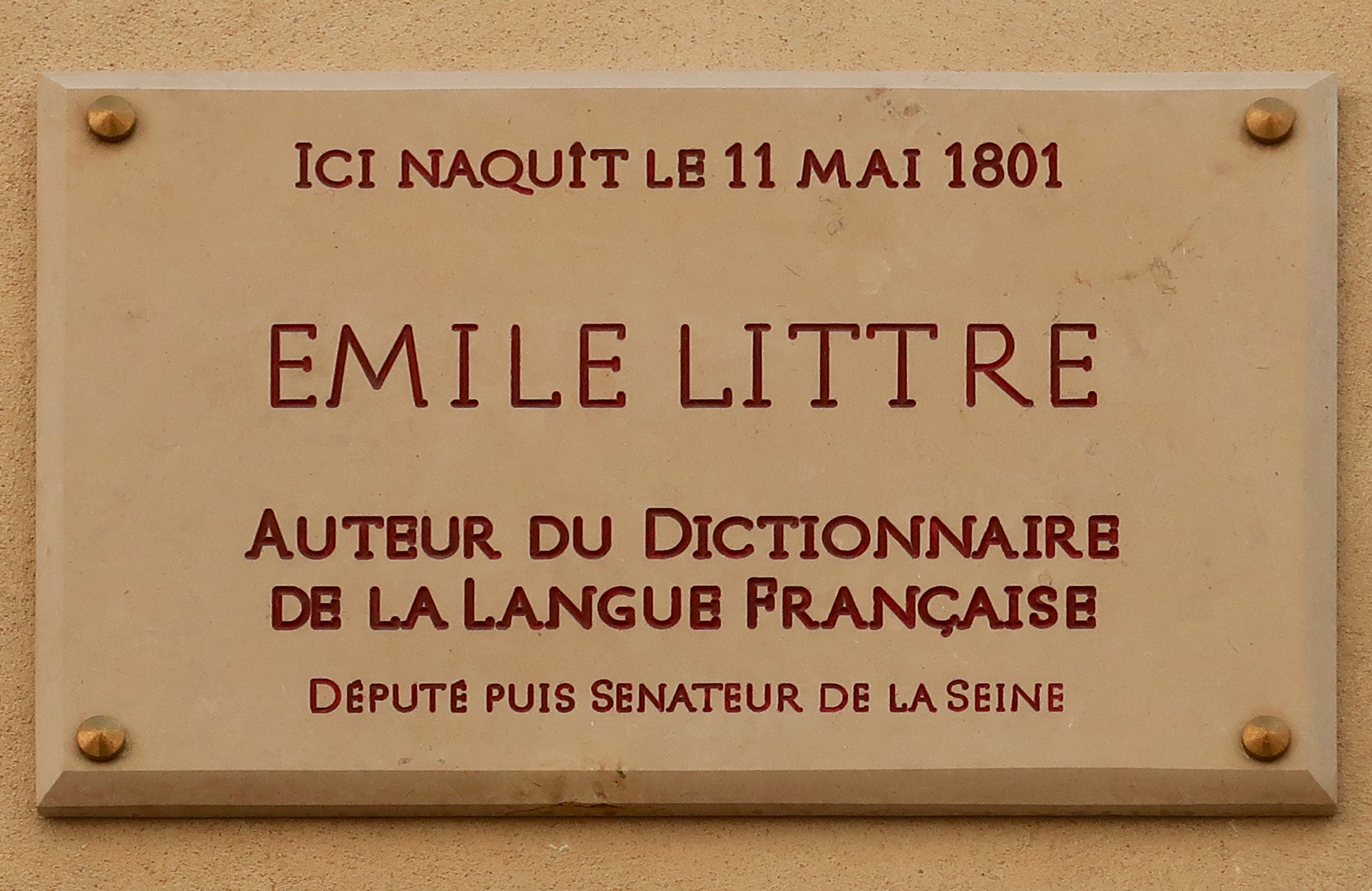 Plaque en hommage à Émile Littré, 21 rue des Grands-Augustins (Paris, 6e).